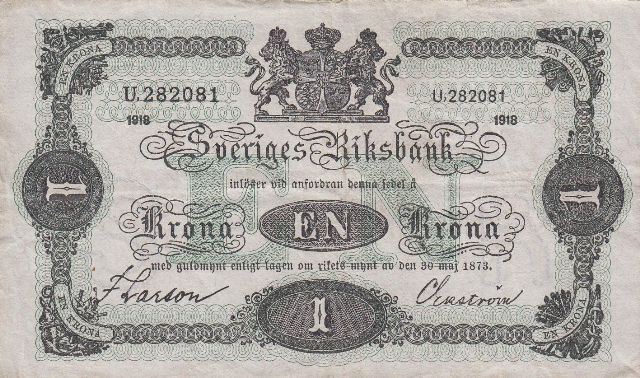 Svéd 1 koronás bankjegy. A típust megszakításokkal 1874 és 1940 között bocsájtották ki.